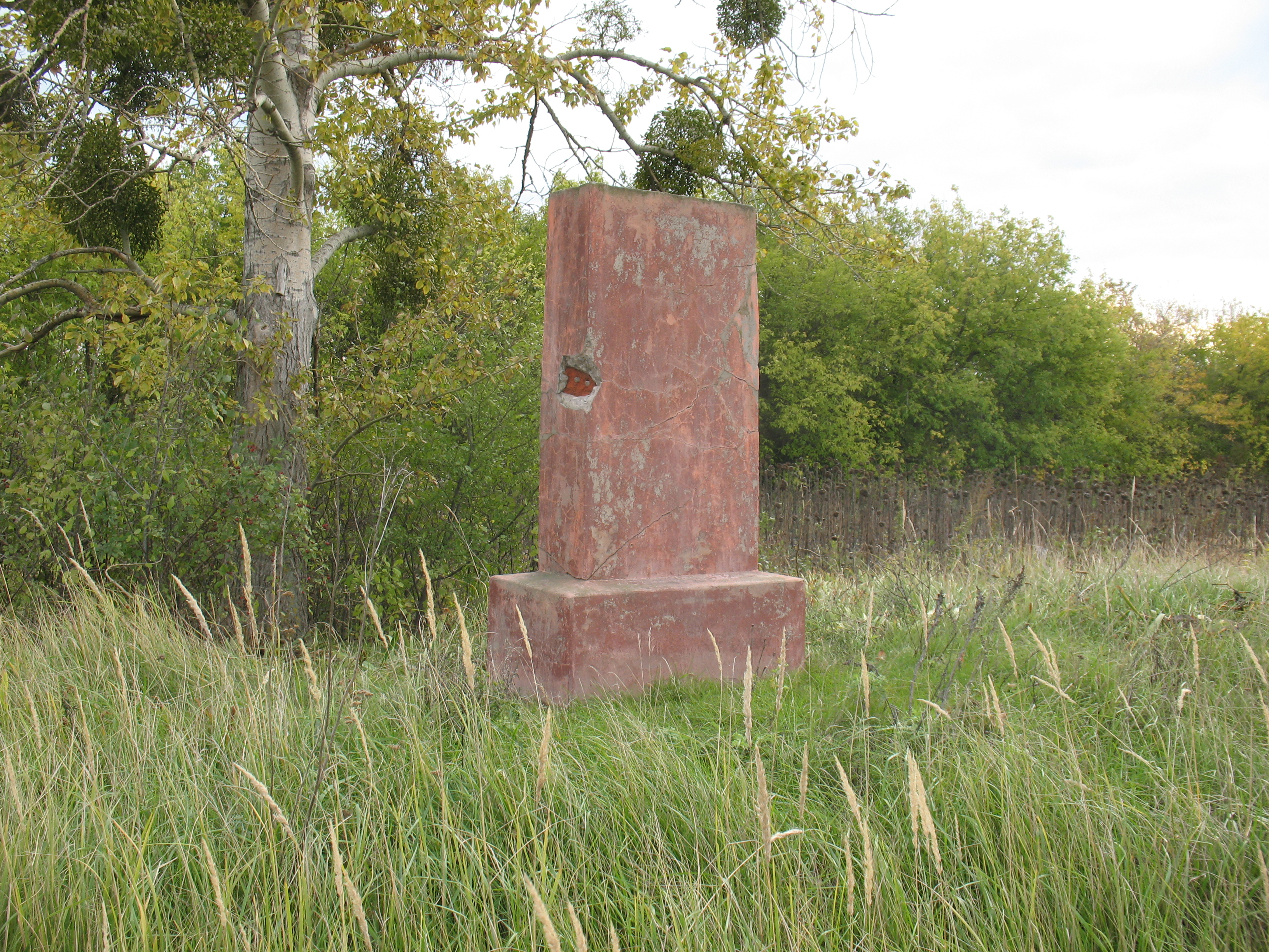 Мемориальный знак в память о городе Царёв-Борисове. Расположен не на месте, где находился город, а рядом с ним.